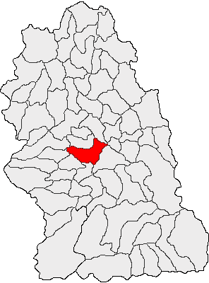 Categorie:Hărţi ale judeţului Hunedoara